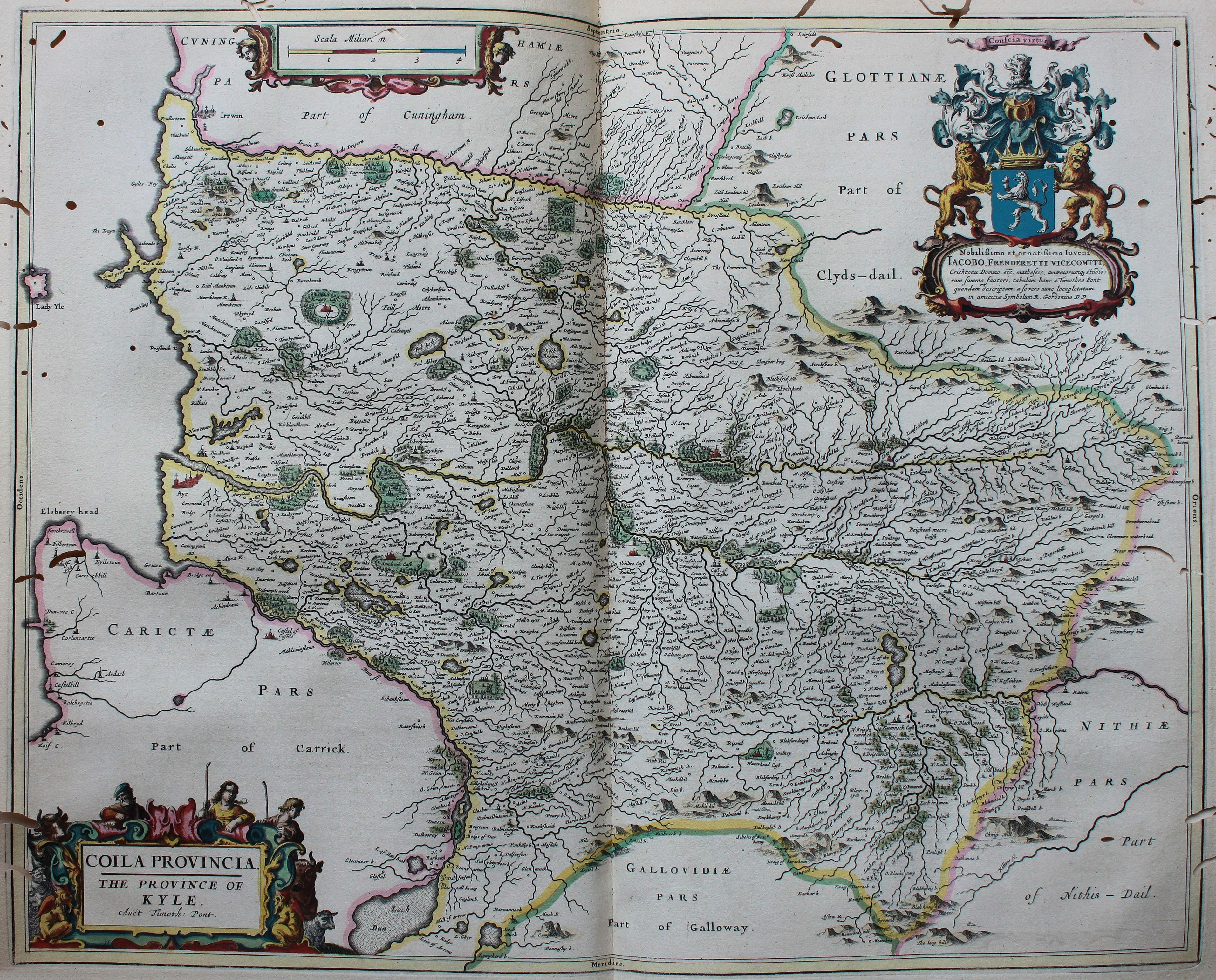 Descripción bibliográfica: Geographia Blaviana. - [Amsterdam : Juan Blaeu, 1659] . - [32], VI, 96 p., 34 f., h. 35a, 35b, 35c, 35d, 36-44 f., 34, [2], 36-40, [2], 43-70 [i. e. 75], [1] f., [20] p. de map., [9] f. de map., [4] f. pleg. de map., [2] f. de plan., [2] f. ge grab. : |bil. ; |cFol. marca major (57 cm.) . - En la dedicatoria a Felipe IV: "Presenta ... El Atlas Universal y Cosmographico de los orbes y terrestre ... Juan Blaeu" . - Título tomado del frontispicio. -- Privilegio fechado en 1659. -Errores de pag. - Sign.: 1, *2, **3, ***-****2, a-e2, A-I2, K1, L-Z2, Aa-Dd2, 4 2, Ee-Ff2, A-I2, K1, L2, M1, N-Y2, Z5, Aa-Dd2, Ee1, A-D2, E-F1, G-I2, K-L1, M-O2, P1, Q-Z2, Aa-Bb2, Cc1, Dd3, Ff-Zz2, Aaa-Bbb2, . - Frontispicio grab. col. -- Incluye un total de 49 il. entre map., plan. i grab. Materia: Atlas - Obras anteriores a 1800 Impresor: Blaeu, Joan, 1596-1673, imp. Lugar de impresión: Holanda. Amsterdam Localización: Vea la ilustración en su contexto Visite también la exposición "Cartografía histórica en la Biblioteca de la Universidad de Sevilla"